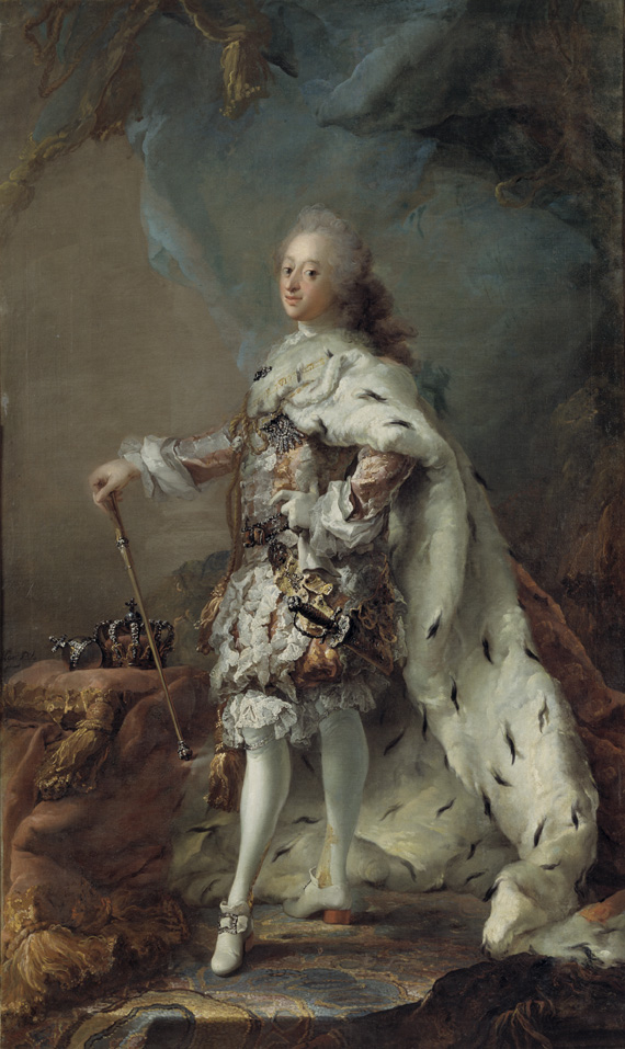 Парадный портрет короля Фредерика V